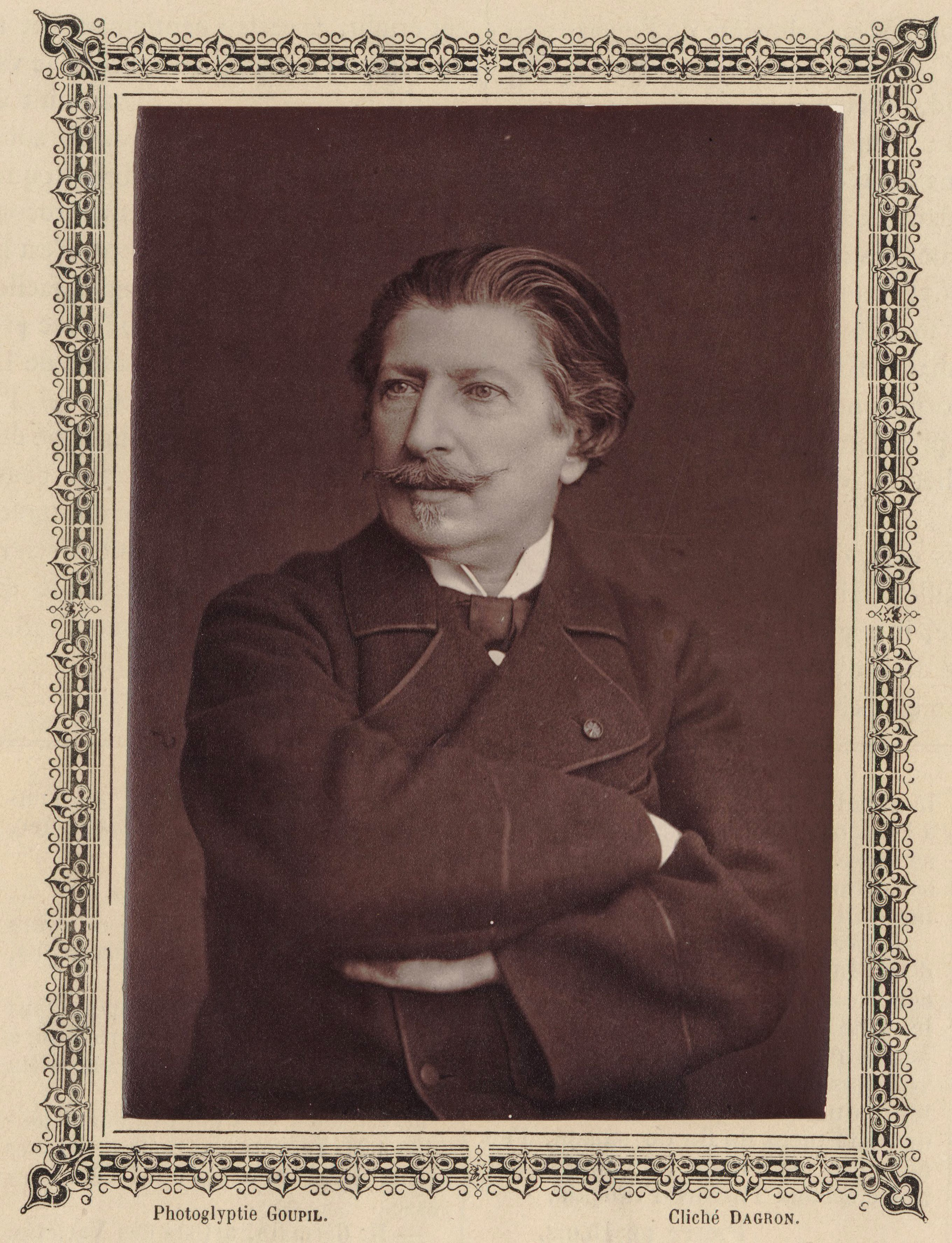 Portrait de Laurent de Rillé en 1880, recadré, source : BNF Gallica